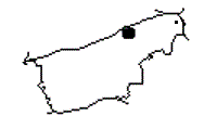 Situació de la masia de Vilaterçana respecte de Calders (Moianès)